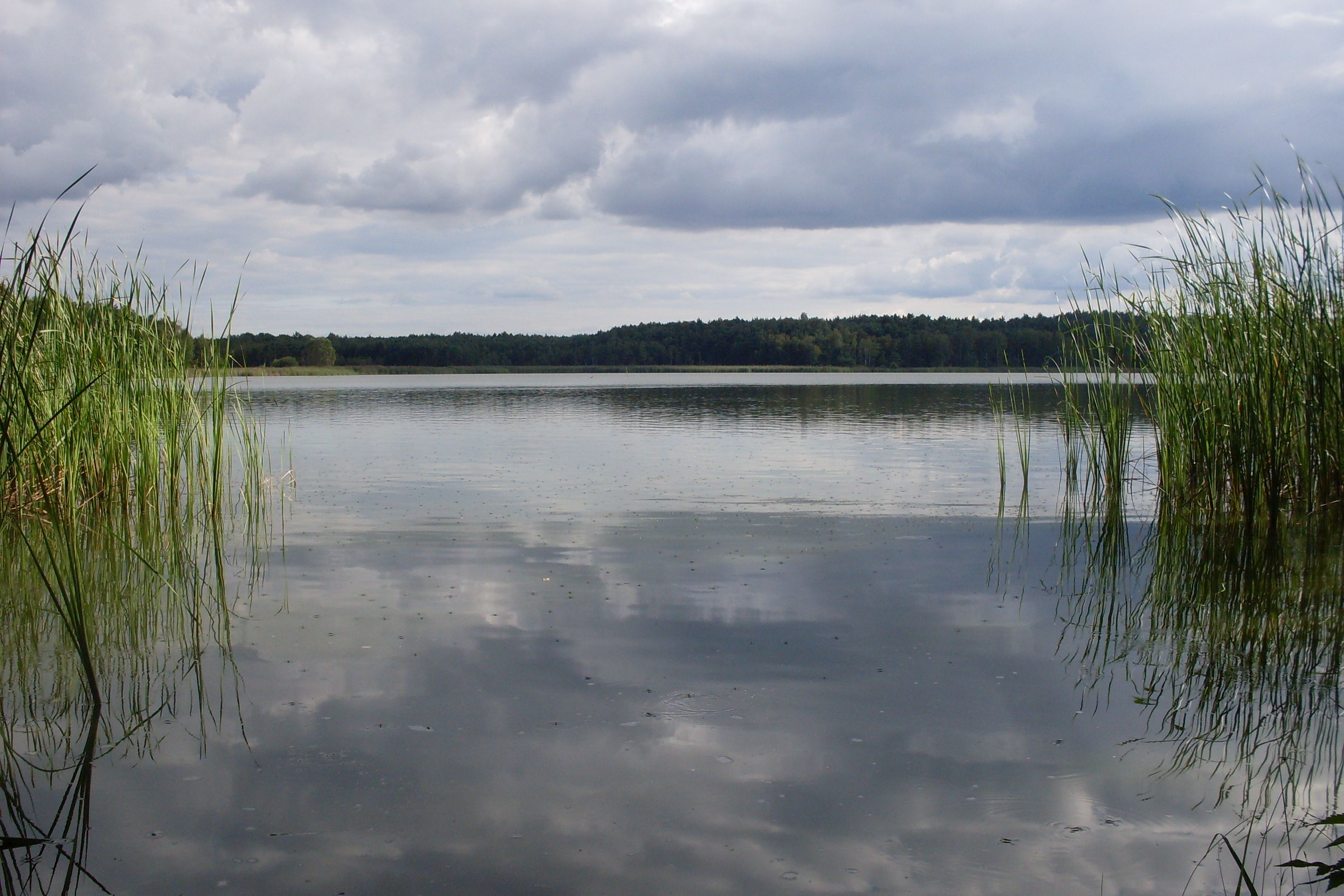 Eine der zahlreichen kleine Seebuchten am Großteich Deutschbaselitz